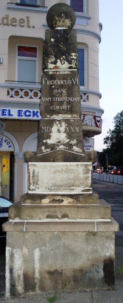 Denkmal an der Altona-Kieler-Chaussee